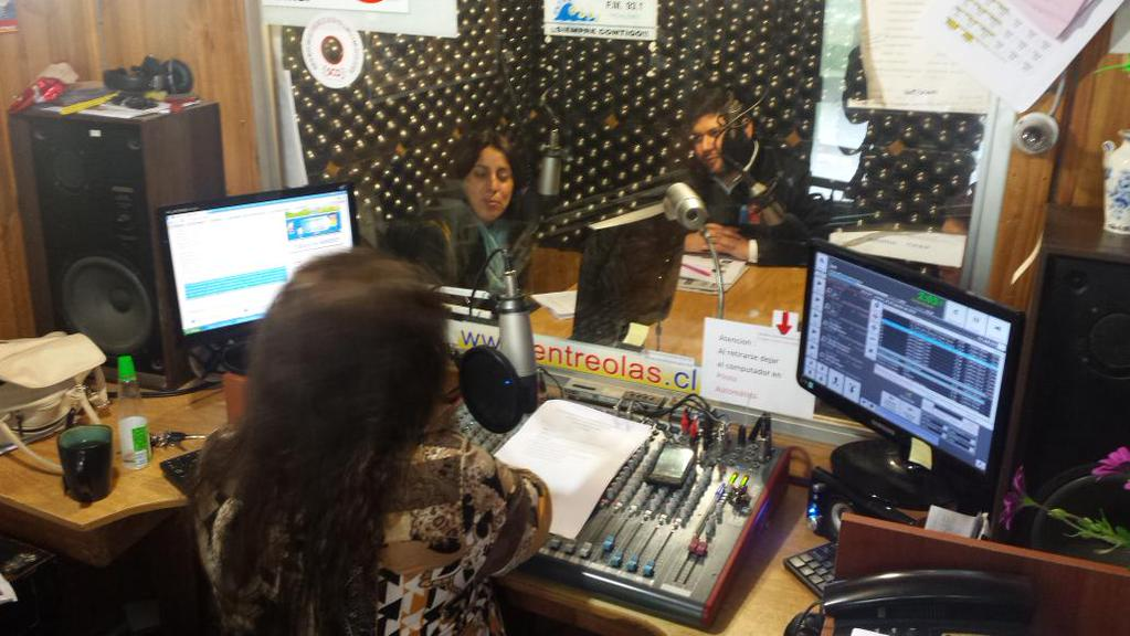 La Subsecretaria del Deporte, Nicole Sáez, siendo entrevistada en Radio Entre Olas 93.1 de Pichilemu.